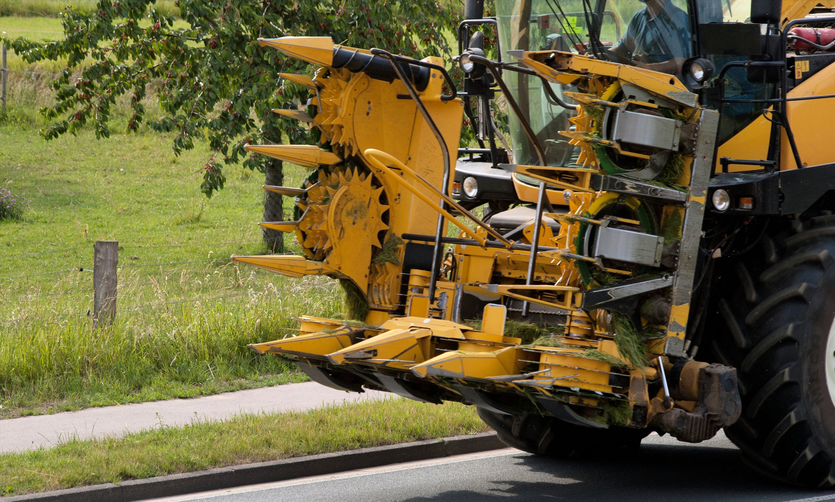 Maiserntevorsatz eines New-Holland Feldhäckslers, für Straßenfahrt zusammengeklappt.